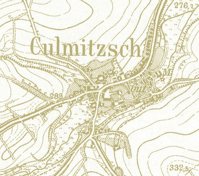 Die Ortslage des ehemaligen Ortes.